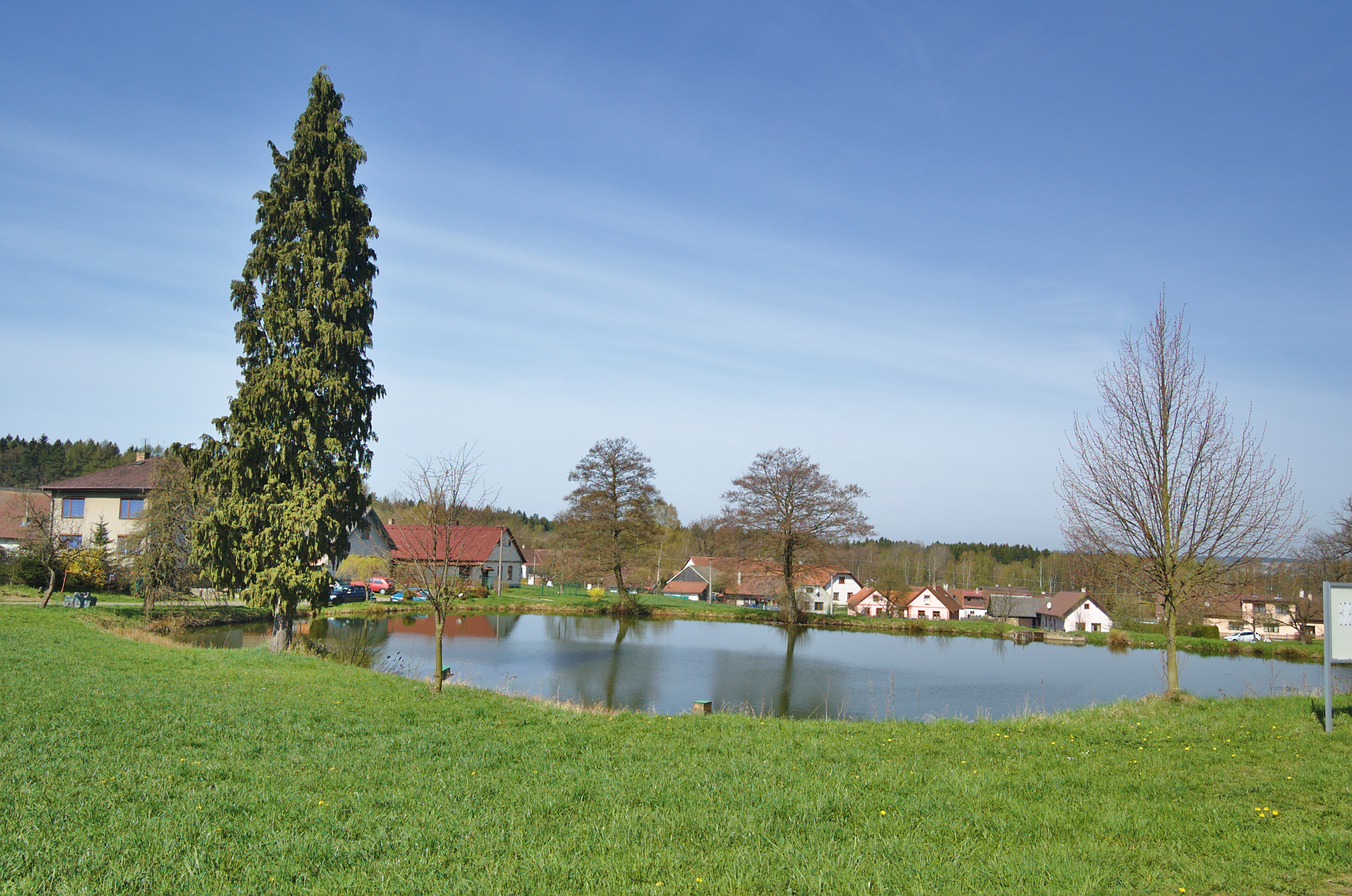 Rybník na návsi, Vintířov, okres Pelhřimov Project: Fotíme Česko